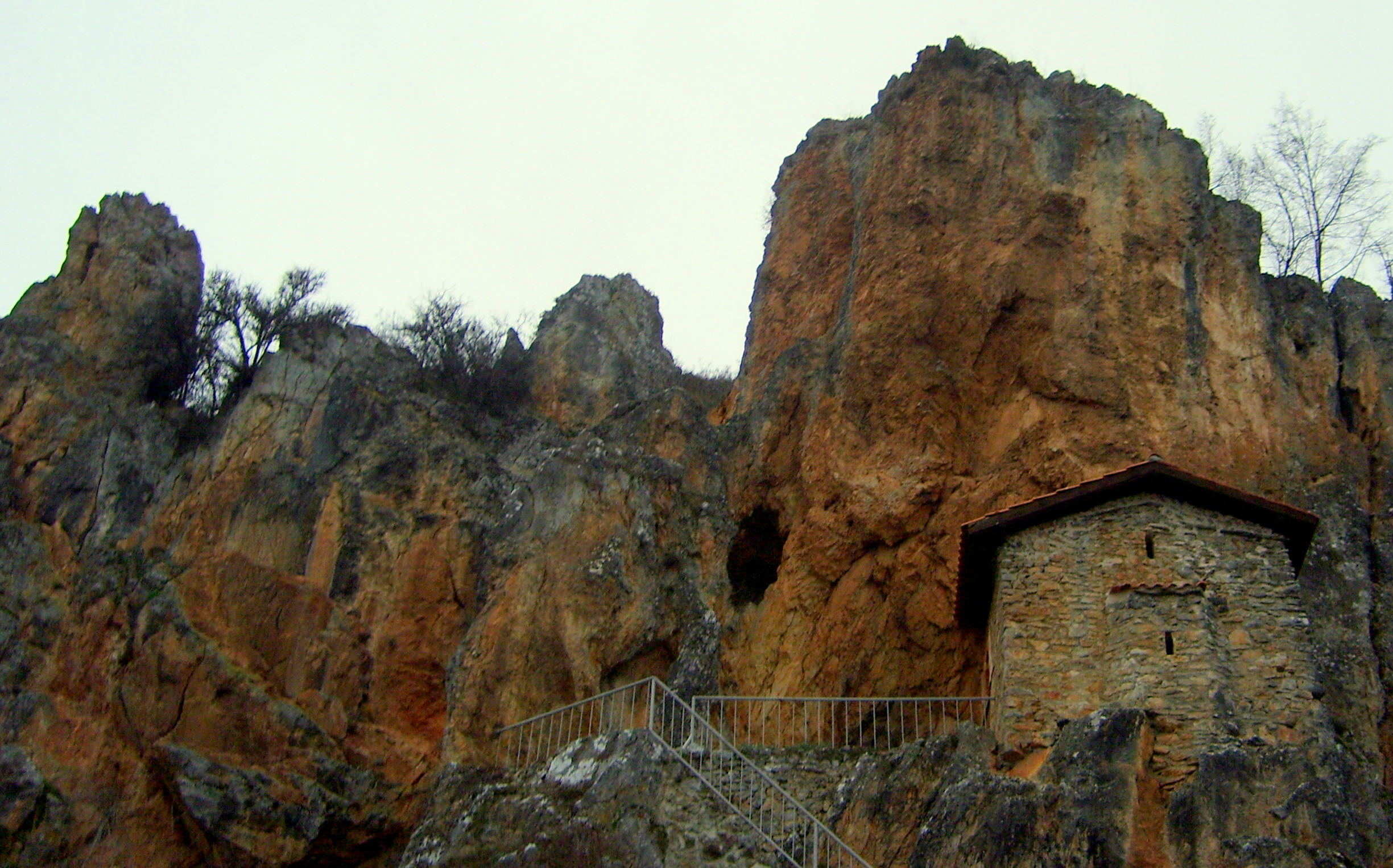 Црквата Свети Атанасиј